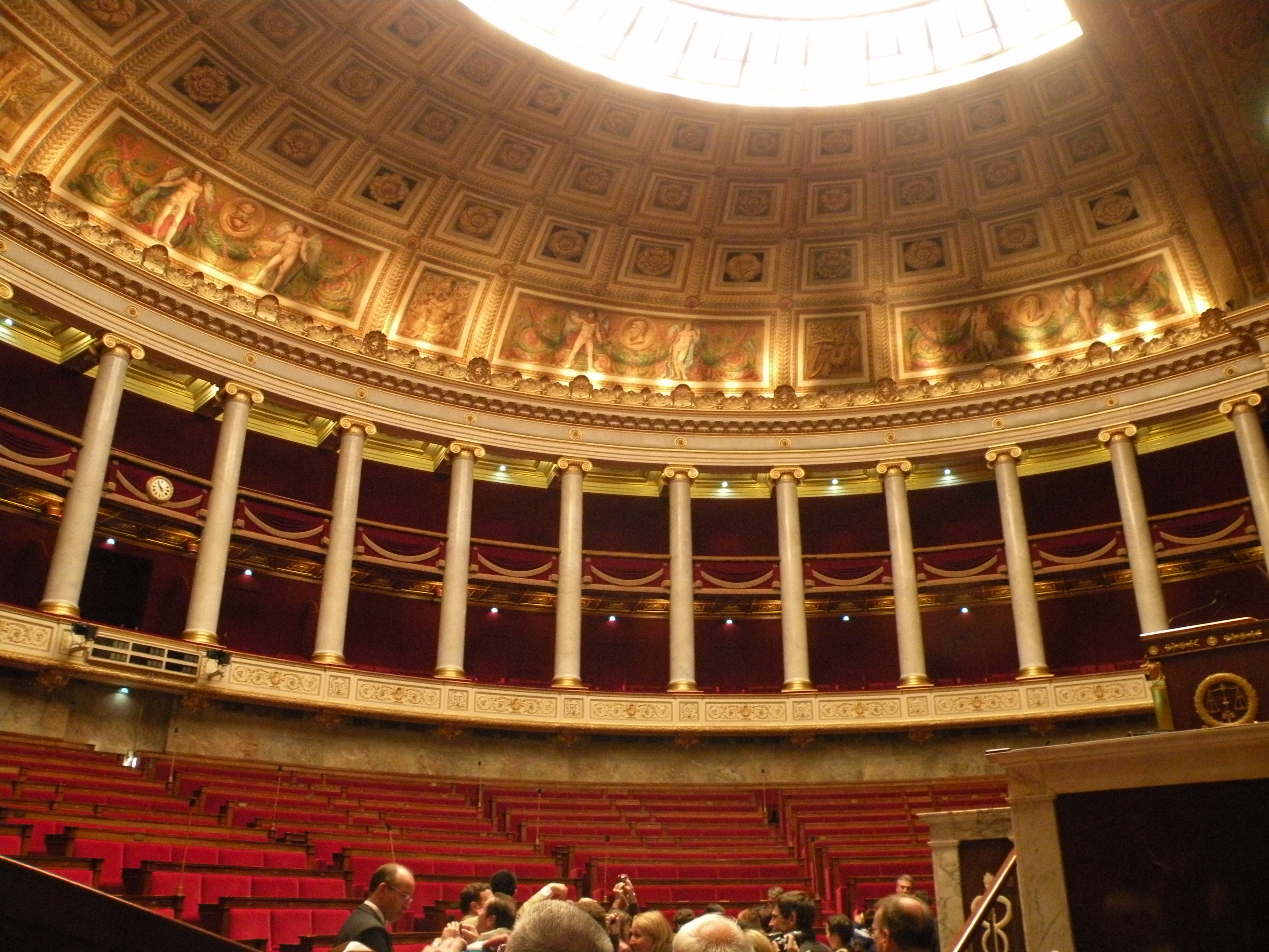 hémicycle